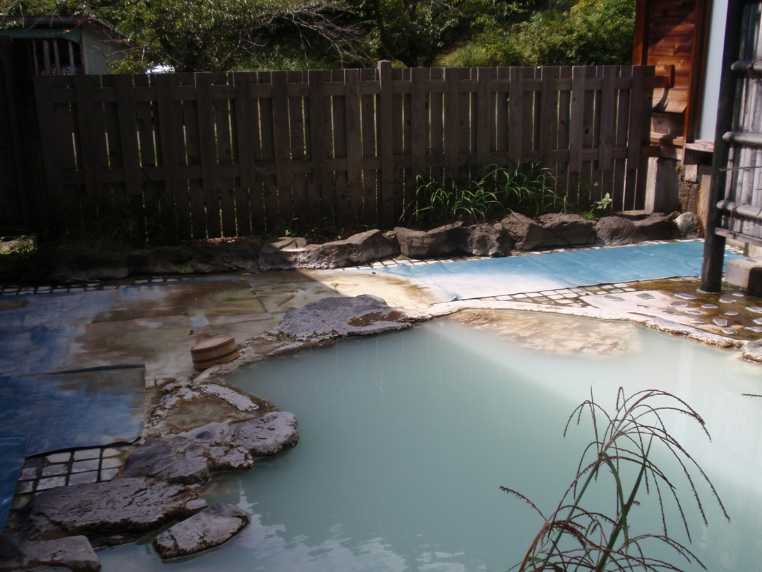 日景温泉露天風呂